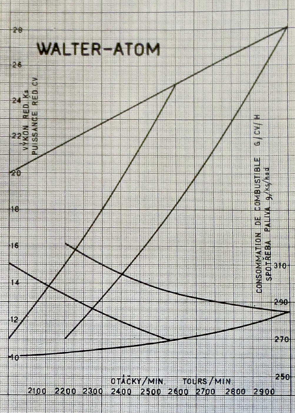 Walter Atom (charakteristiky motoru)